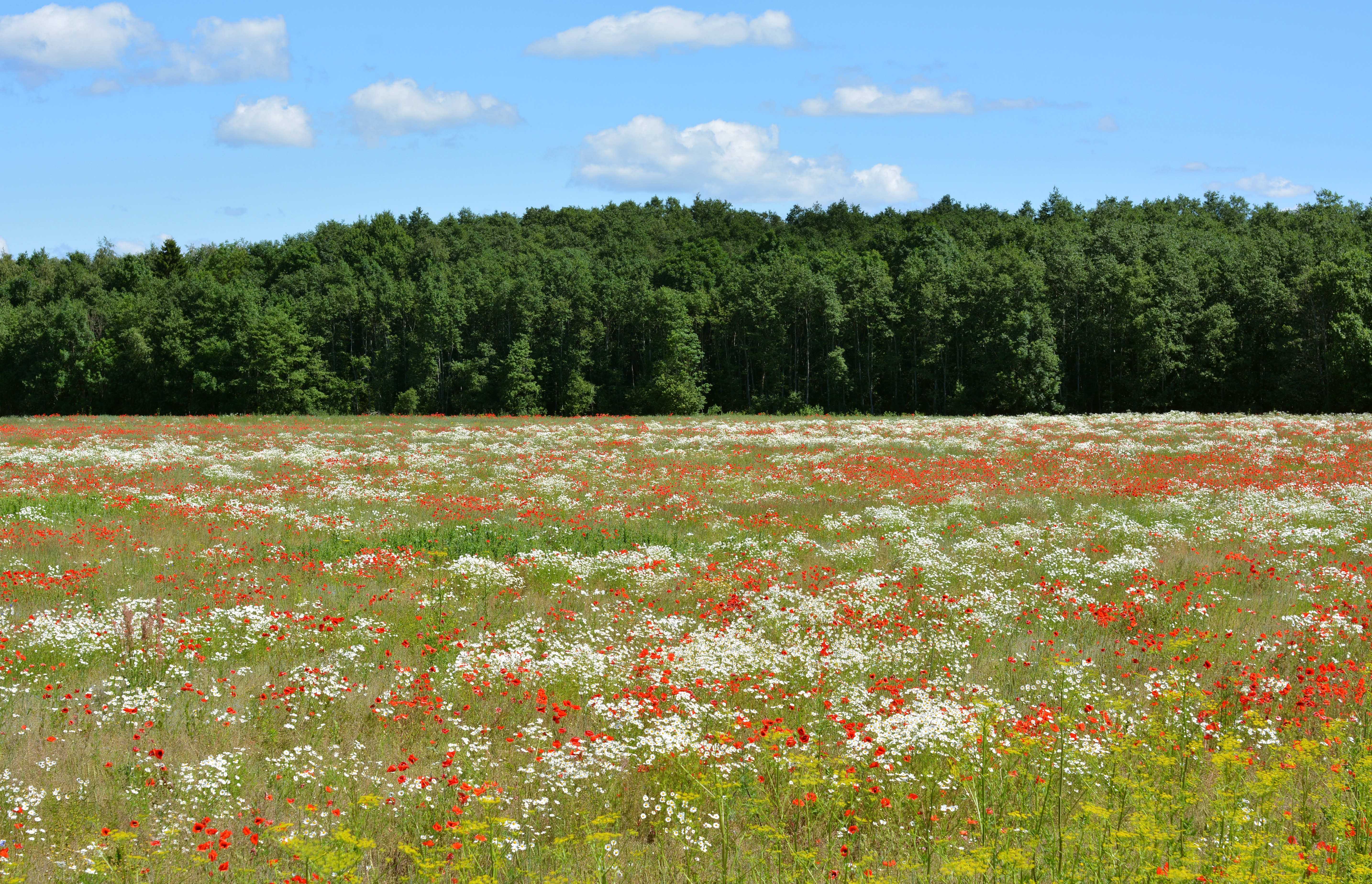 Vaade Keila-Keila-Joa maanteelt*